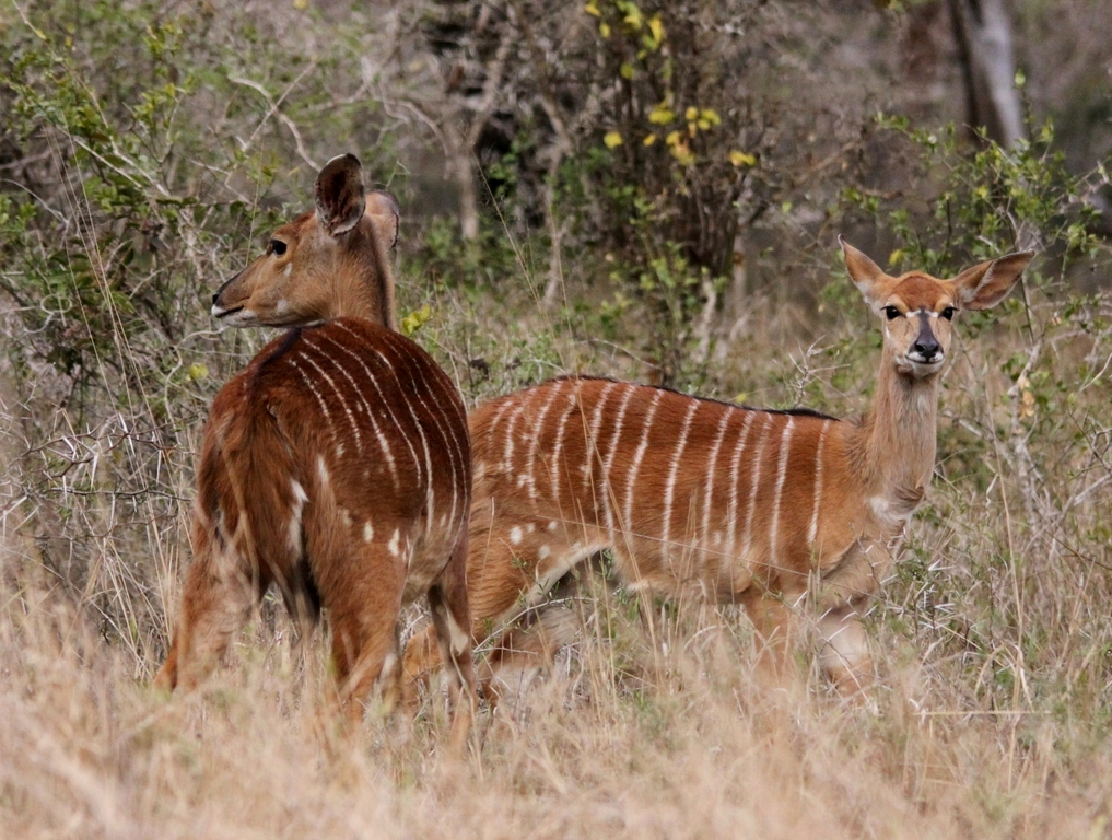 Nyala, Tragelaphus angasi - two does